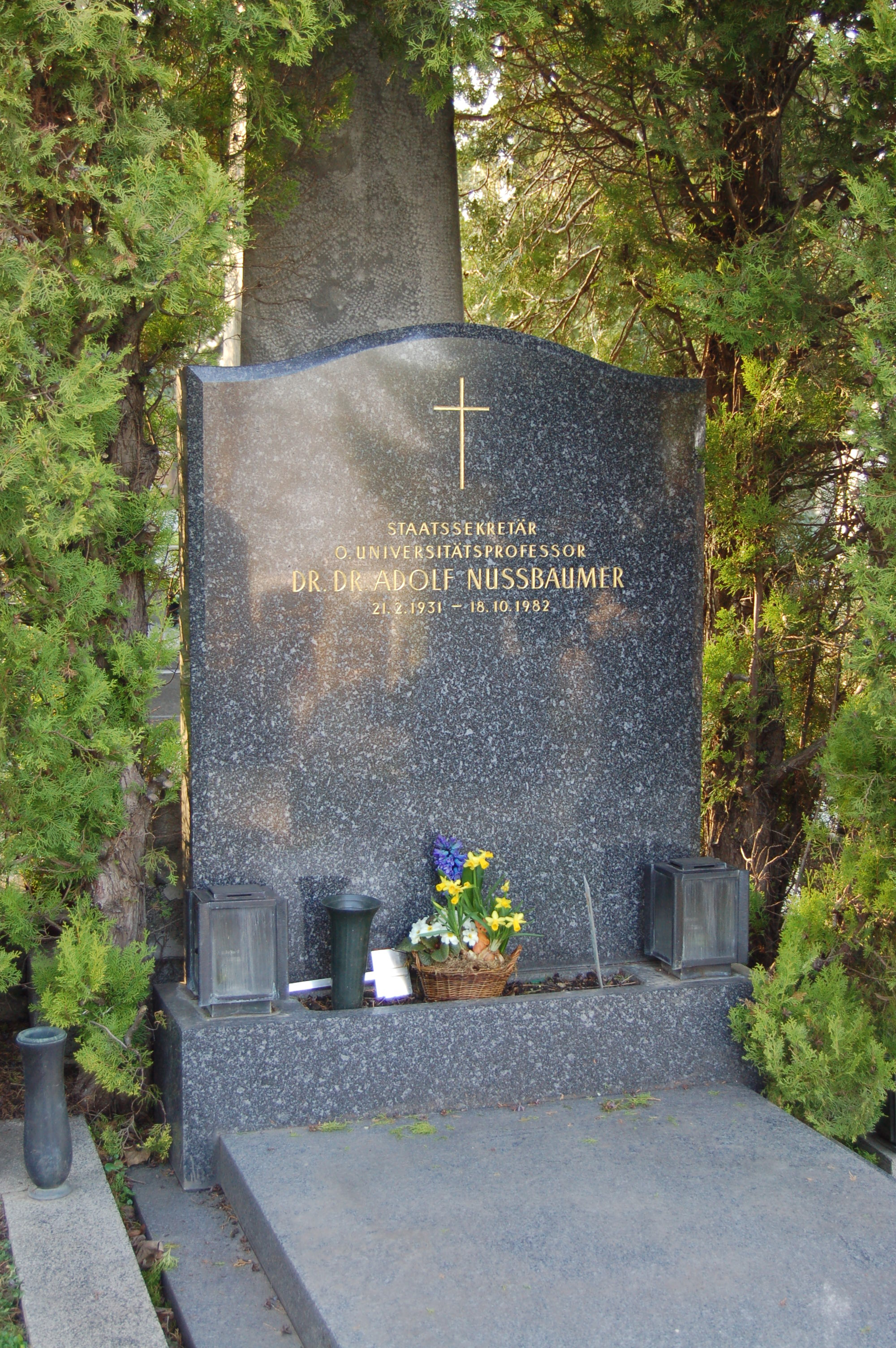 Neustifter Friedhof, Grabstätte von Adolf Nußbaumer (Ehrengrab der Stadt Wien)